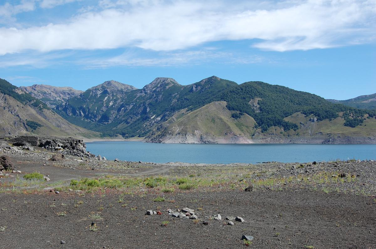 Laguna Laja en Región del Bio Bio, Chile.